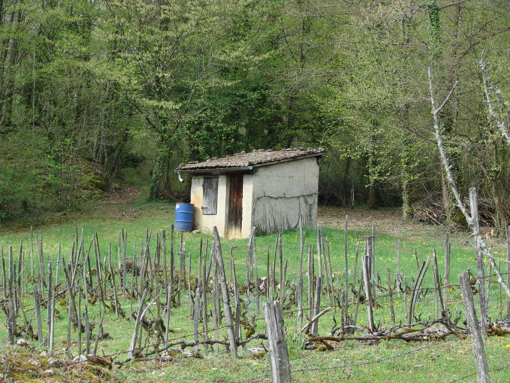 Un grangeon